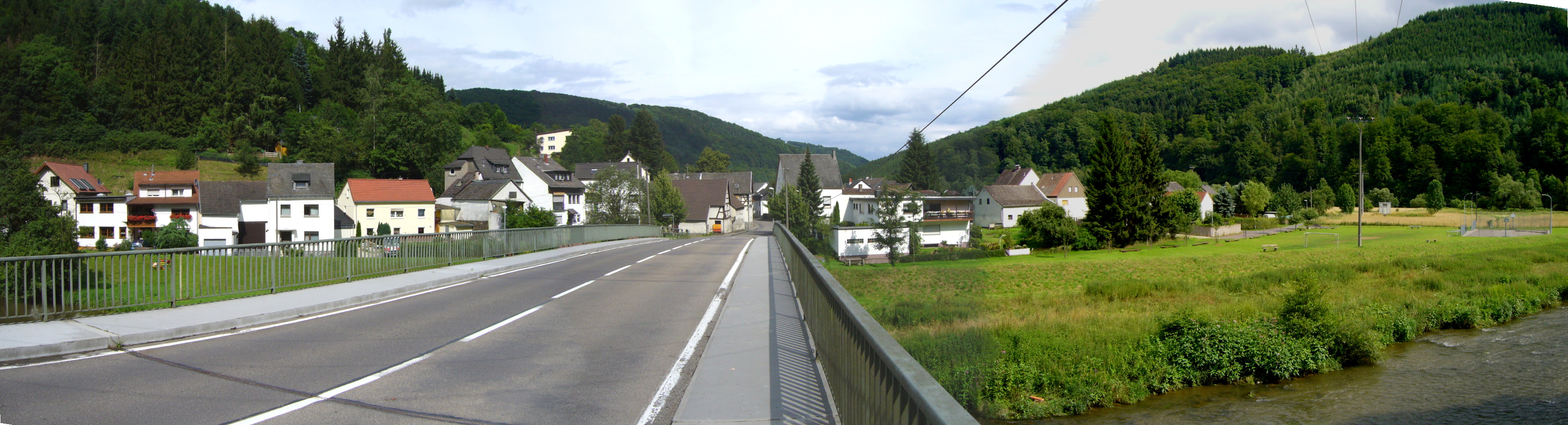 Panorama Datzeroth